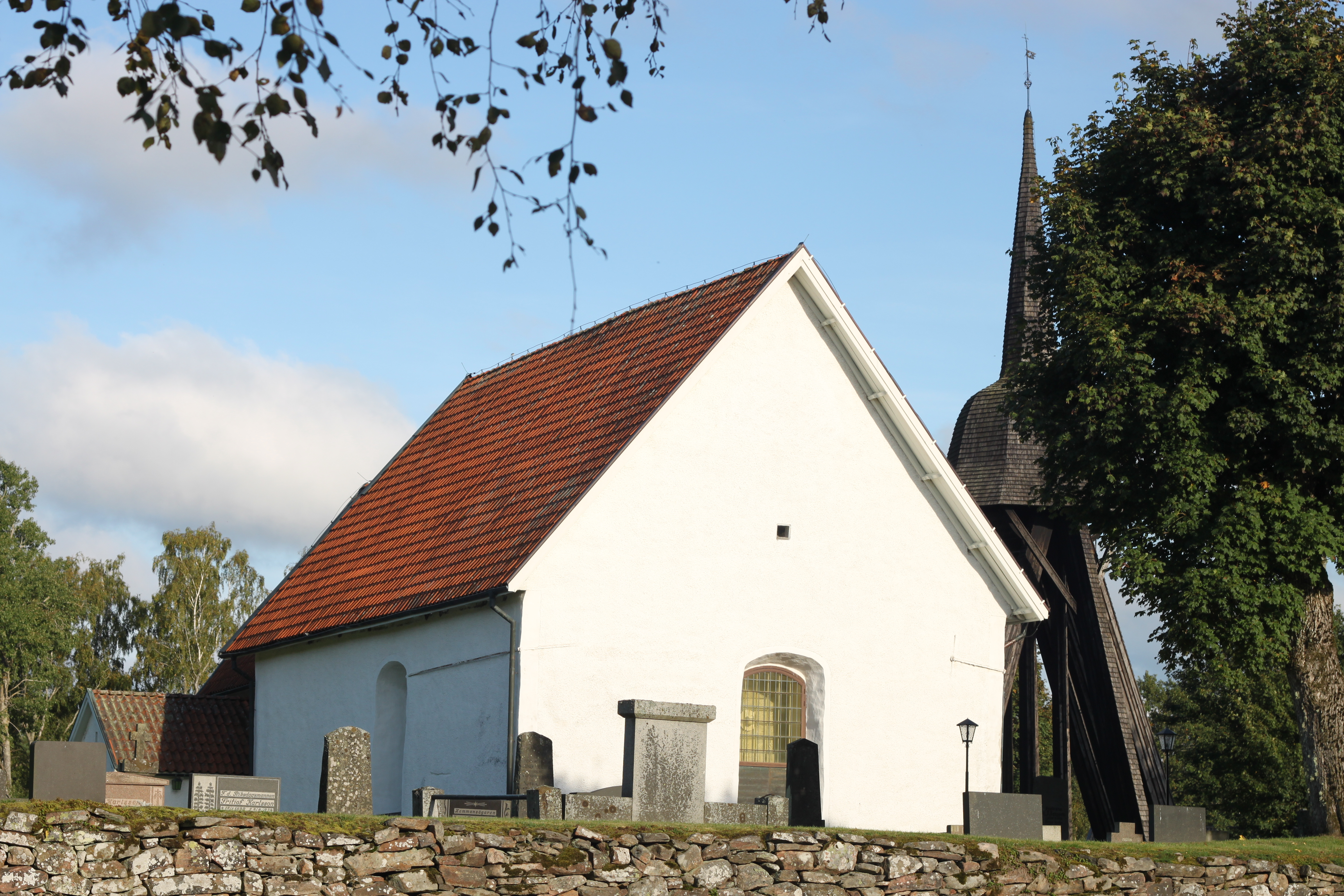 Nöttja kyrka med klocktorn